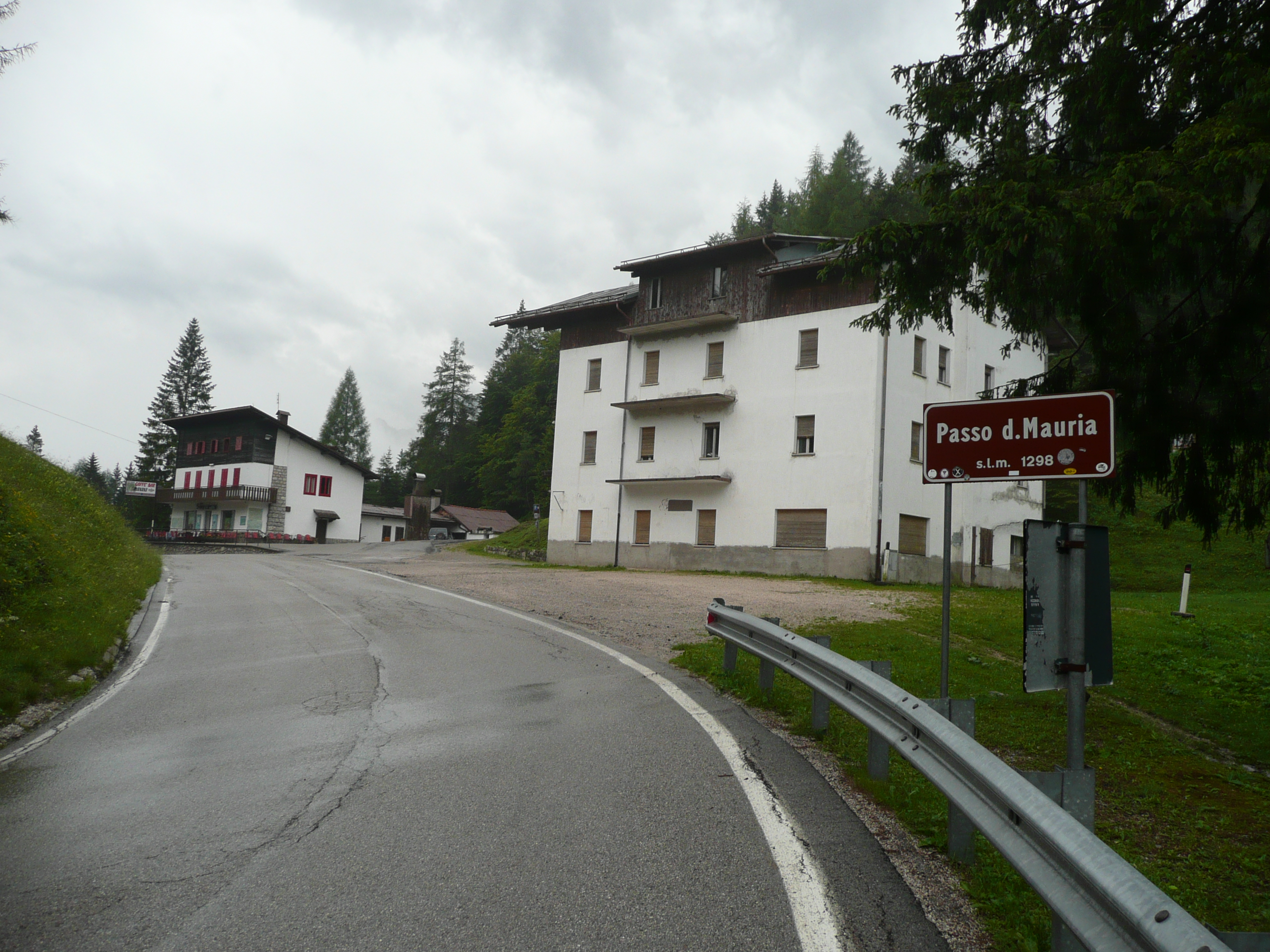 eng: Pass Mauria in the Italien Alps de: Pass Mauria (Passo d. Mauria) in den italienischen Alpen